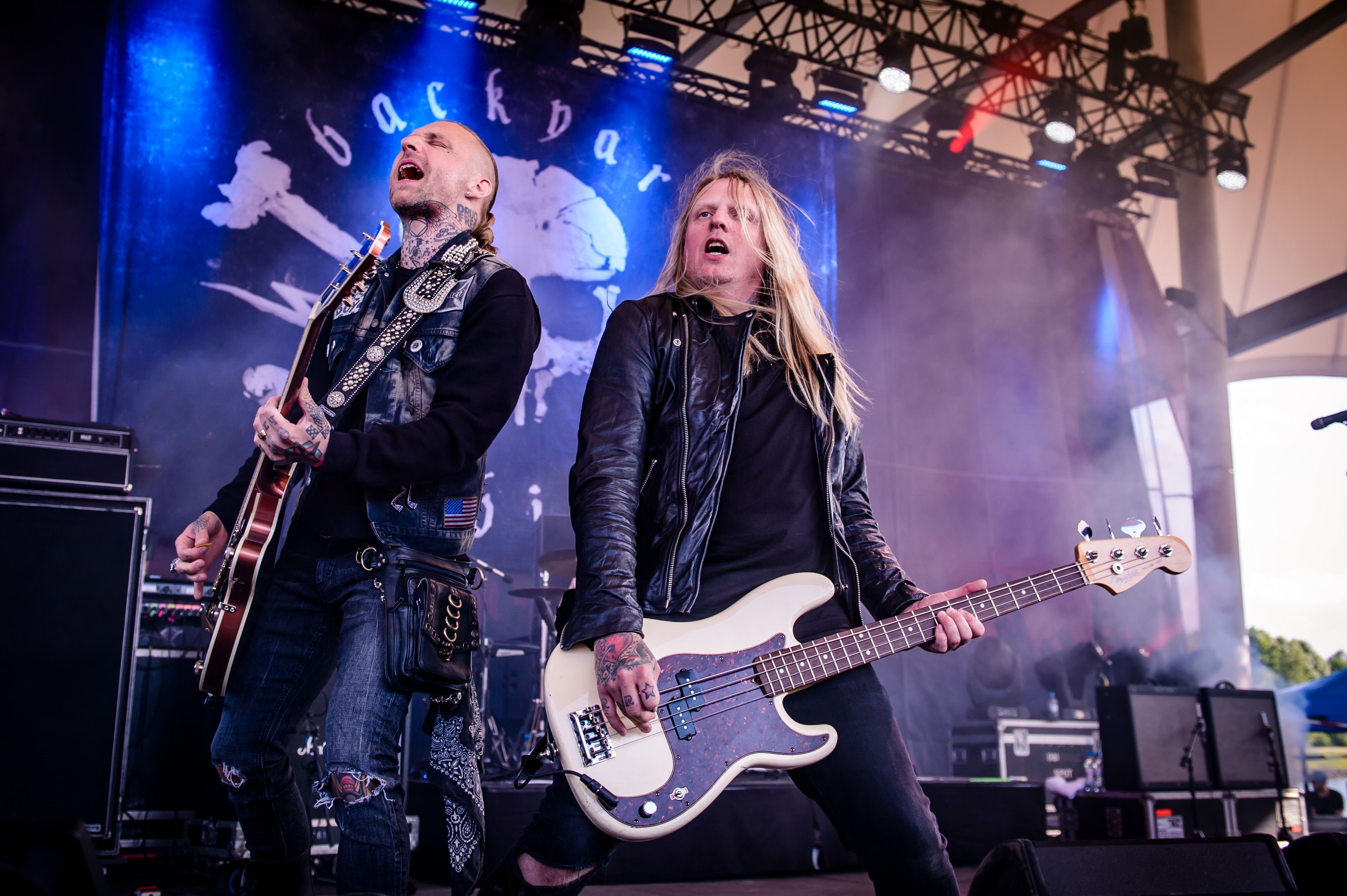 'Rock Hard Festival 2018; Amphitheater Gelsenkirchen': 'Backyard Babies'